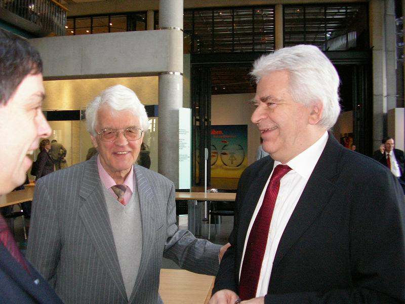 Lothar Schmid und Boris Spasski im Haus der Geschichte am 21. Januar 2007 in Bonn